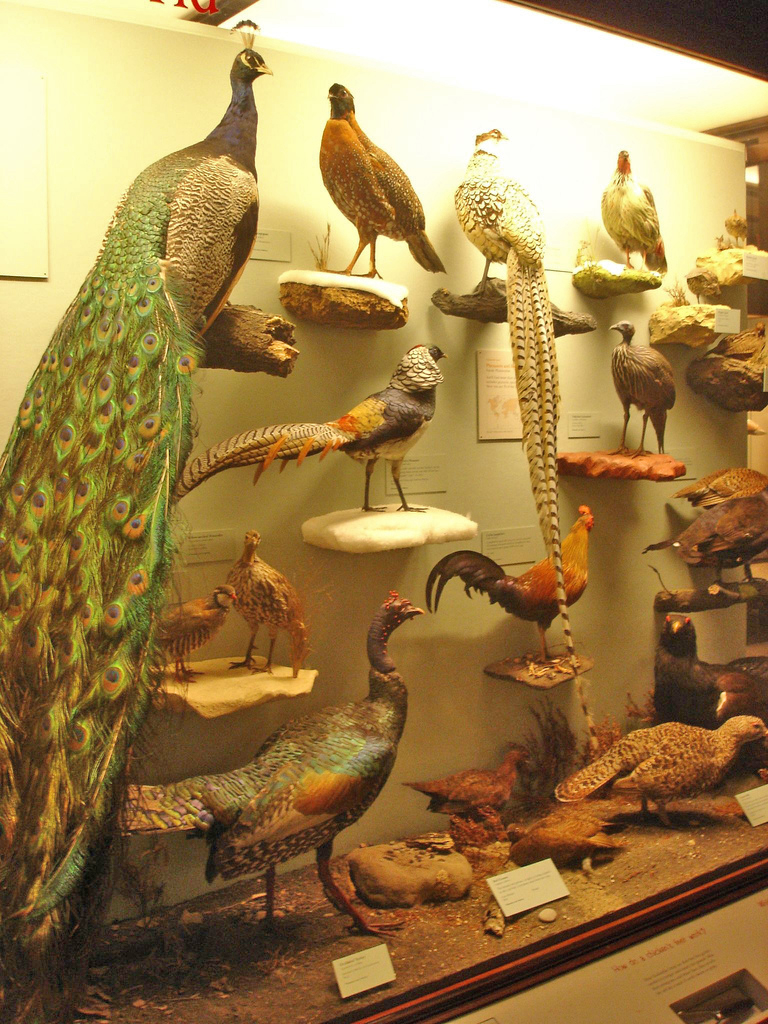 Héngervullen am Fild-Muséi zu Chicago